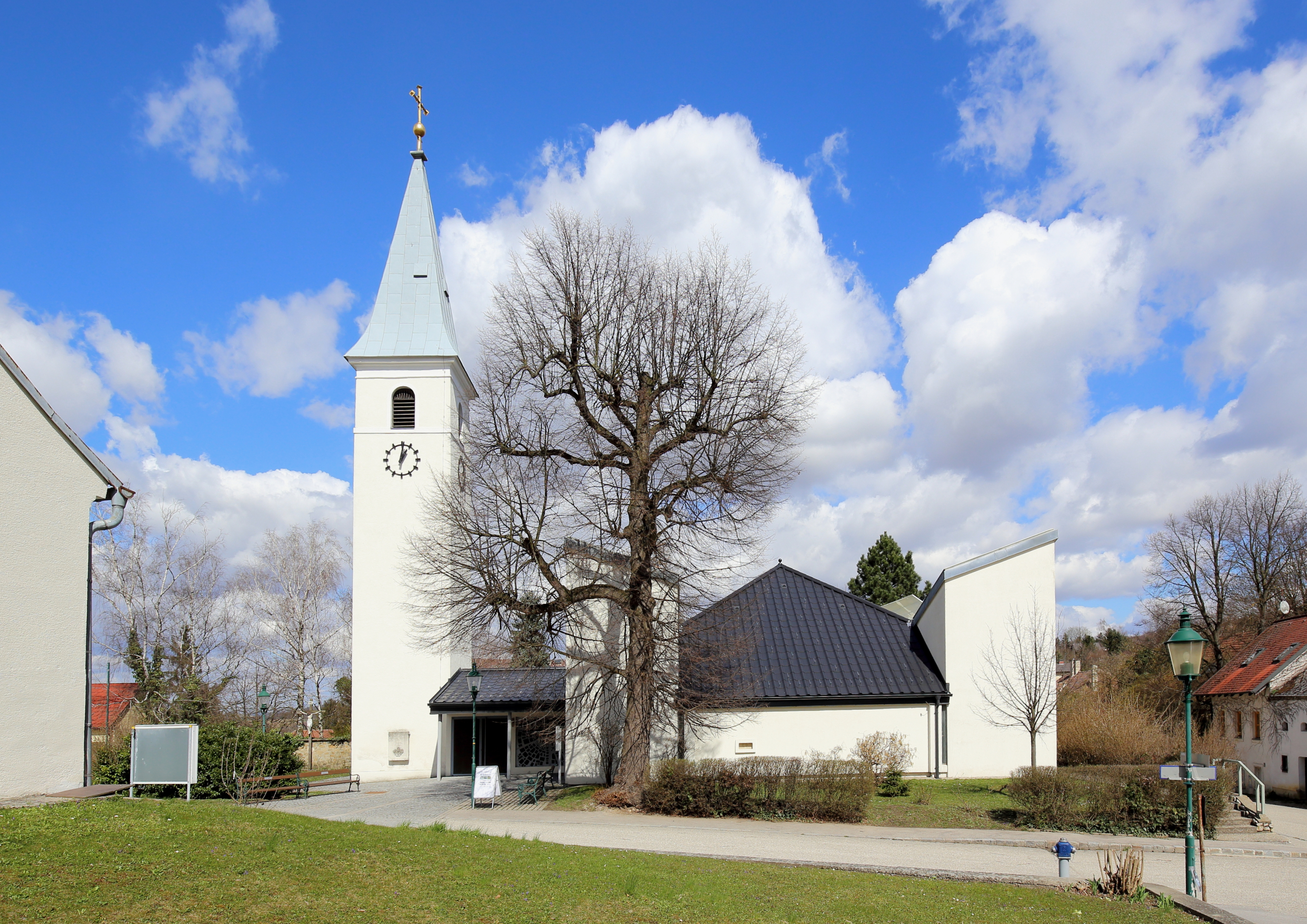 Südansicht der katholischen Pfarrkirche hl. Vitus in Würnitz, ein Ortsteil der niederösterreichischen Marktgemeinde Harmannsdorf. Die Kirche wurde 1971 nach Plänen des Architekten Erwin Plevan unter Einbezug des Kirchturmes vom Vorgängerbau errichtet.